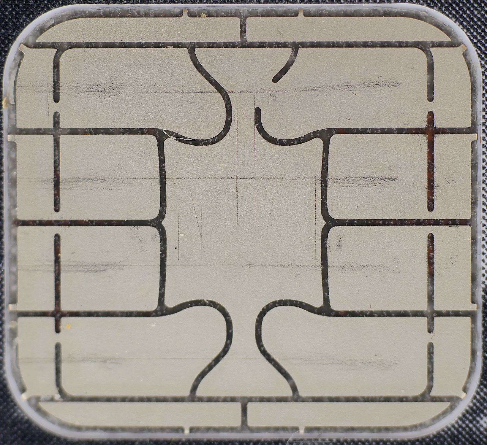 Kontaktfeld auf der Vorderseite einer Kreditkarte von Mastercard mit elektrischen Kontakten